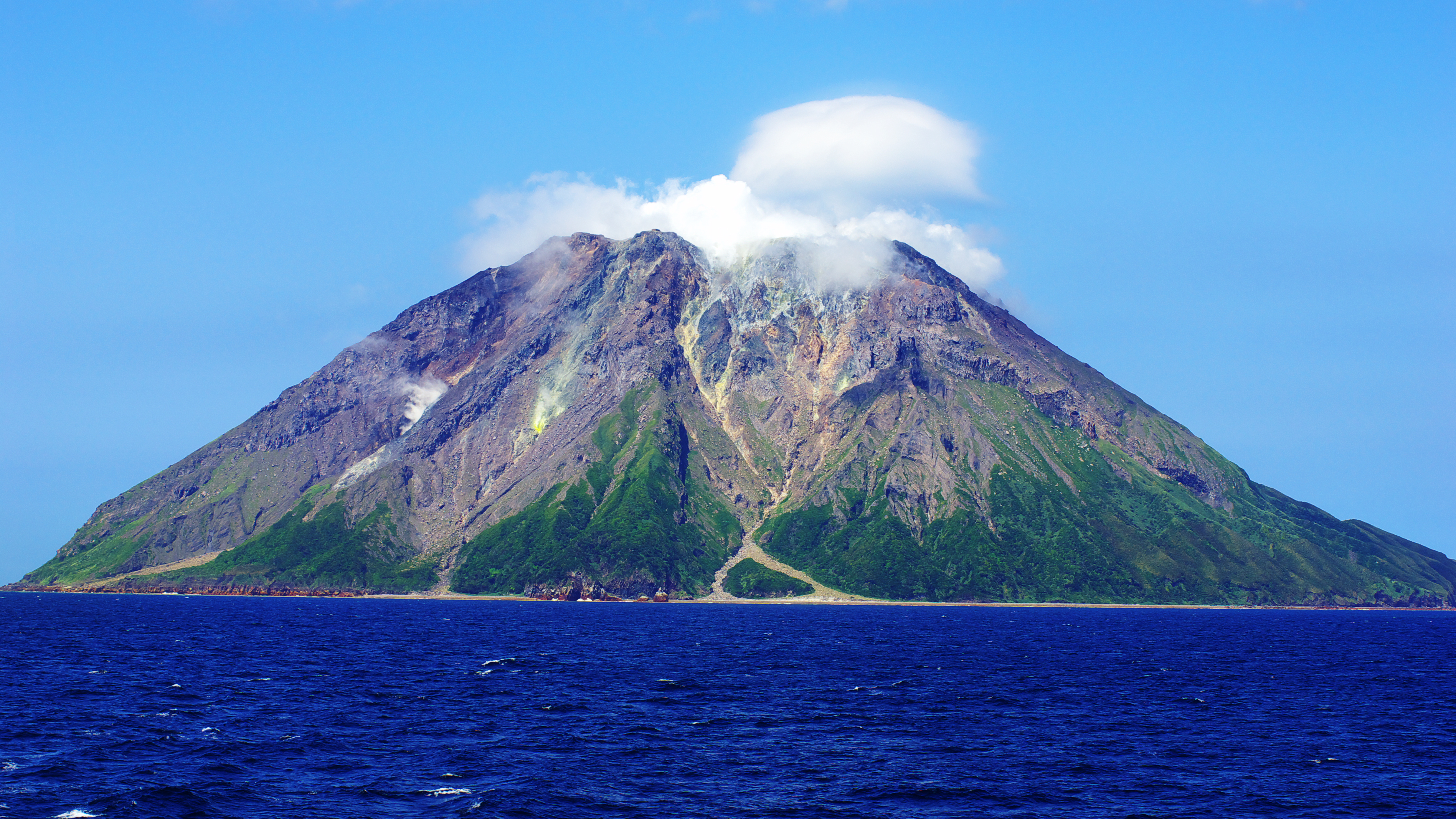 薩摩硫黄島、硫黄岳。東方より。フェリーみしま船上より撮影。